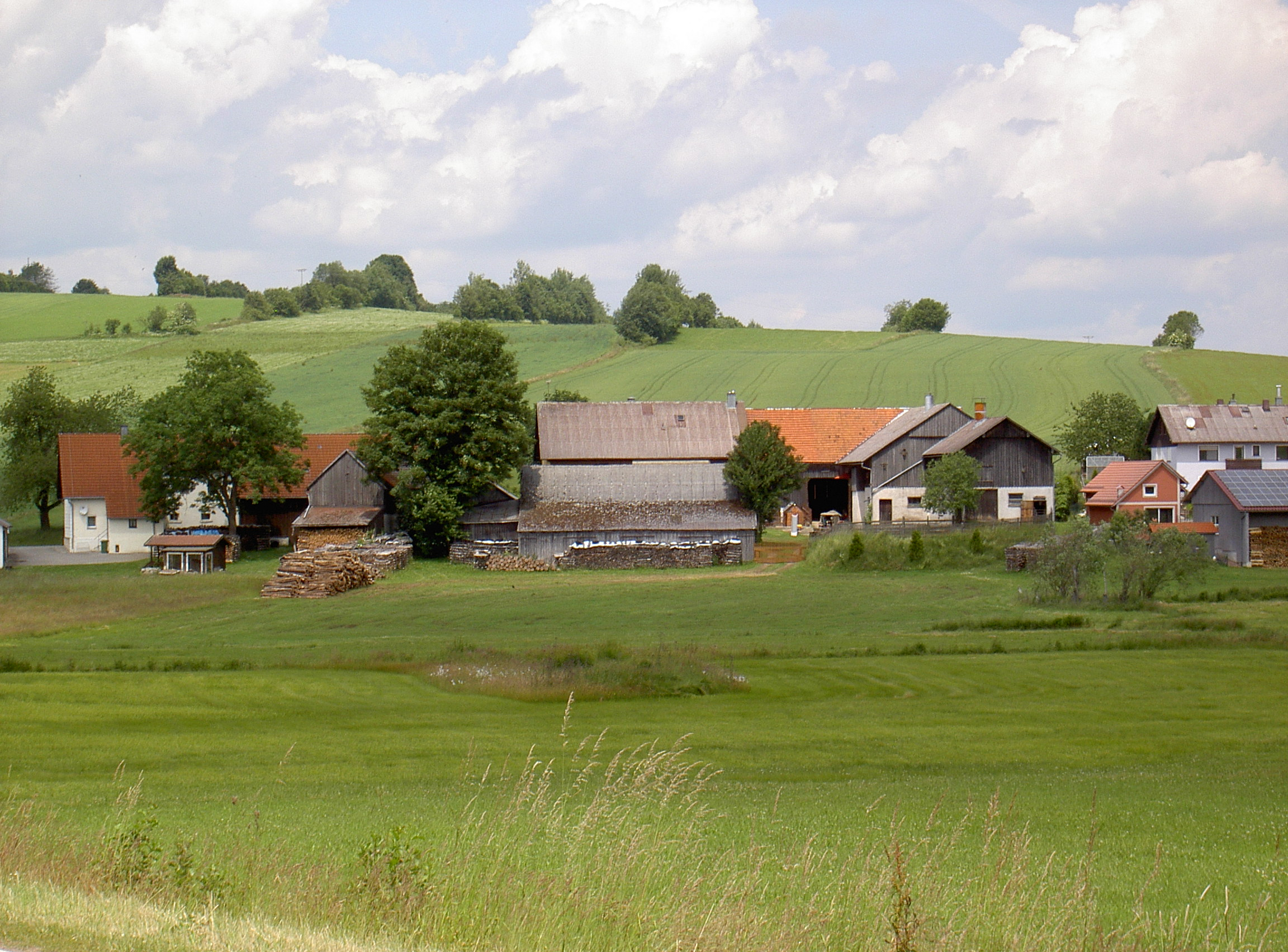 Weberhäuser